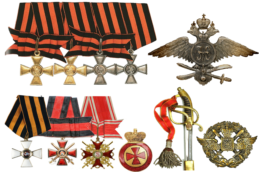 ВИШНЯКОВ Василий Федорович,Награды до1917г.